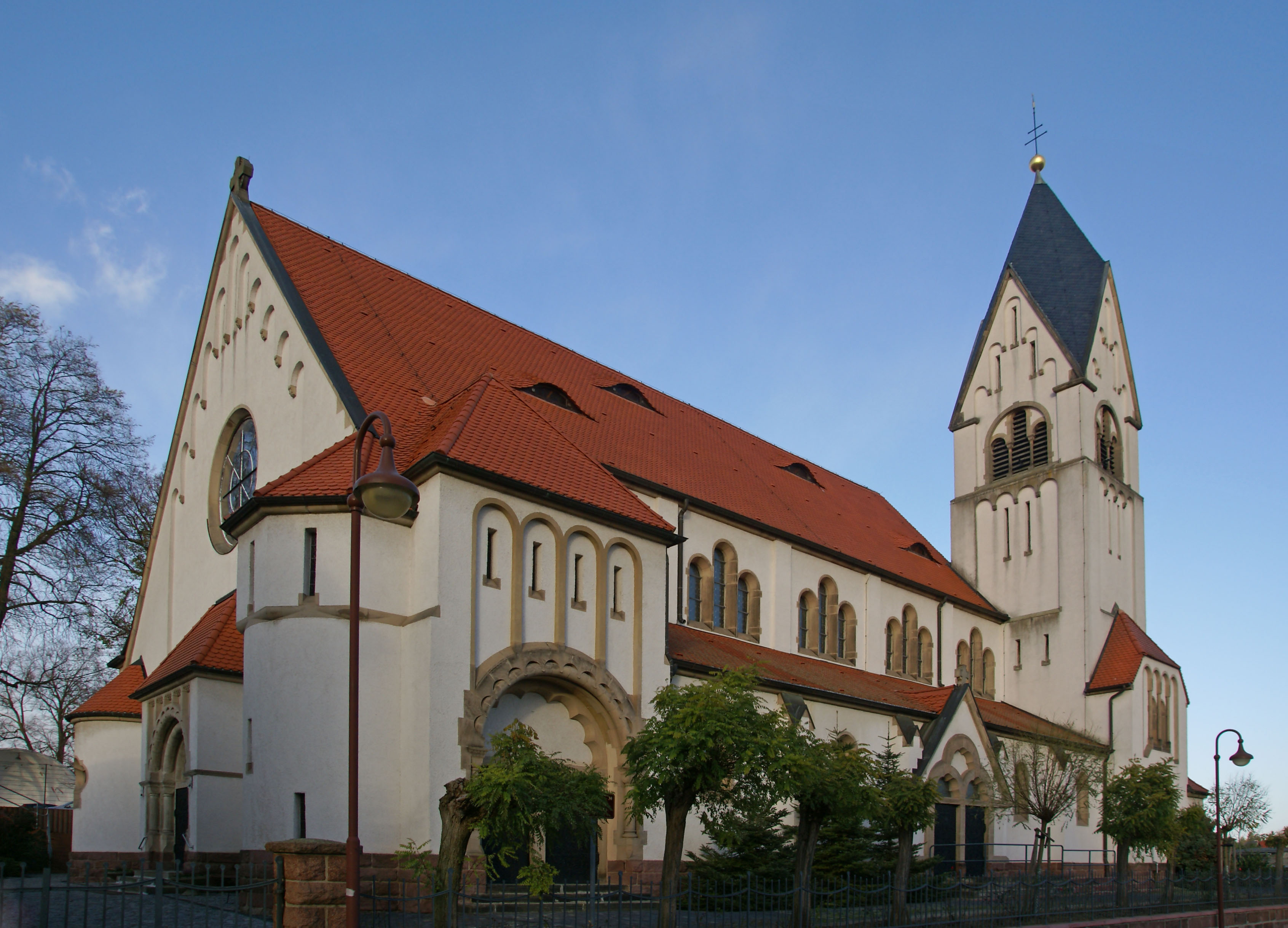 Die katholische Kirche St. Barbara in Helbra, erbaut 1911/1912